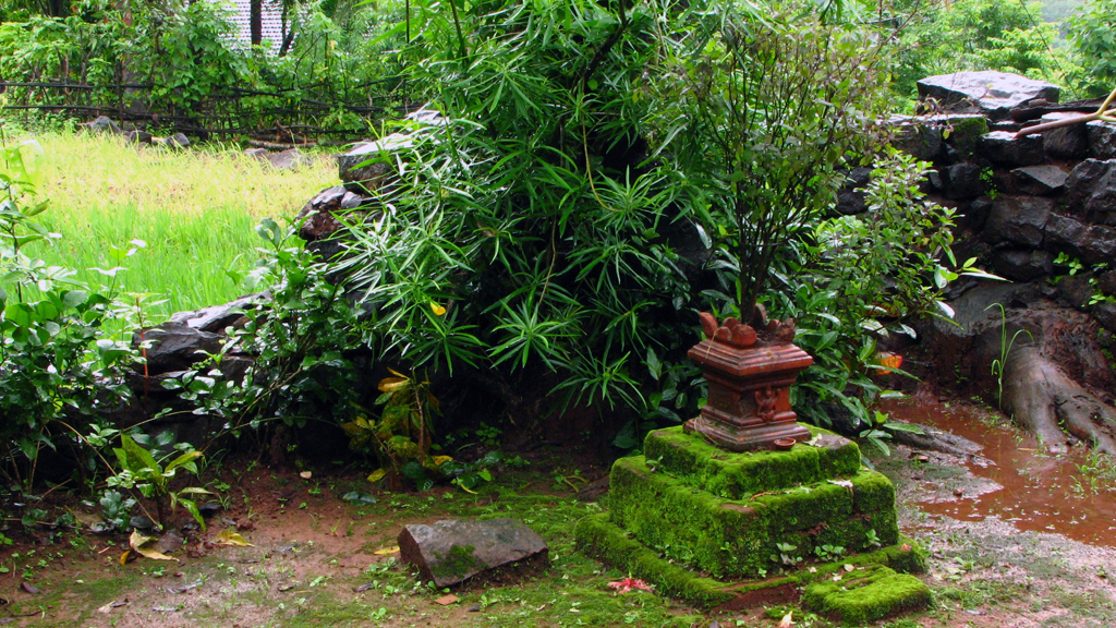 Tulsi